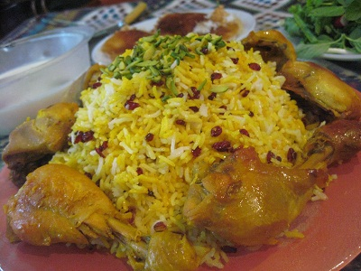 زرشک پلو با مرغ